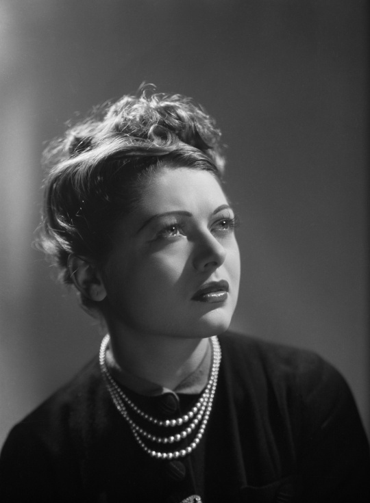 Il s'agit d'un portrait de Léo Marjane pris en 1940 par les Studio Harcourt